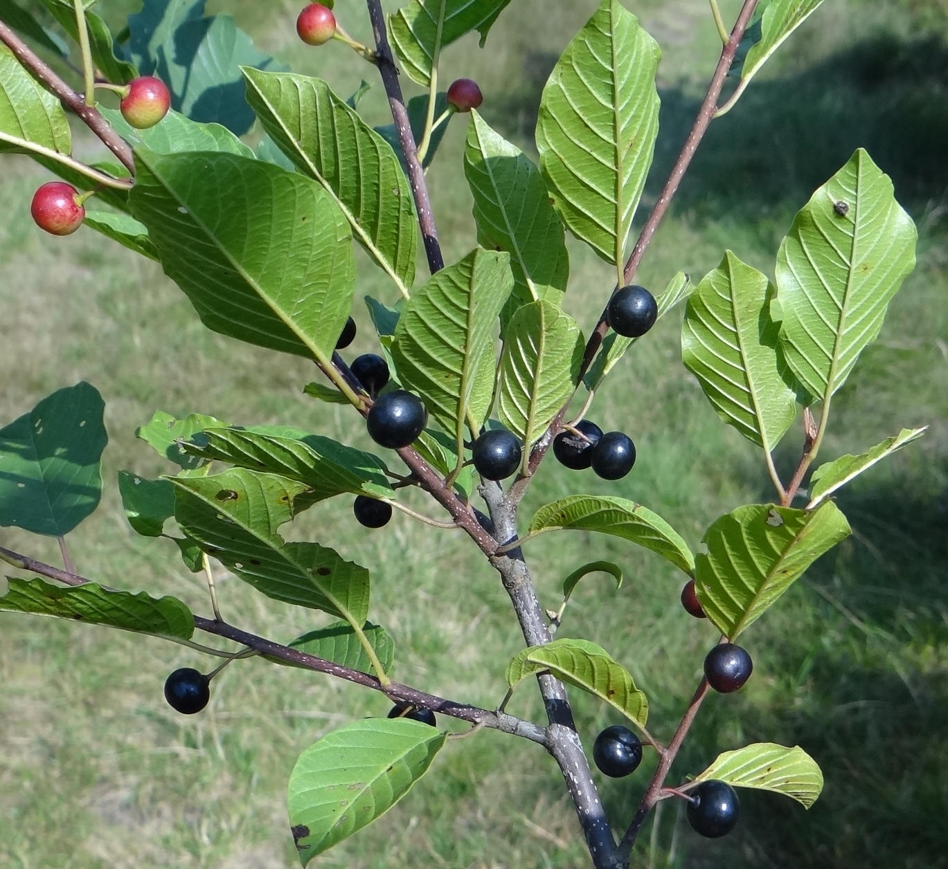 Frangula alnus. Location: Poland, Trzciana (województwo małopolskie)